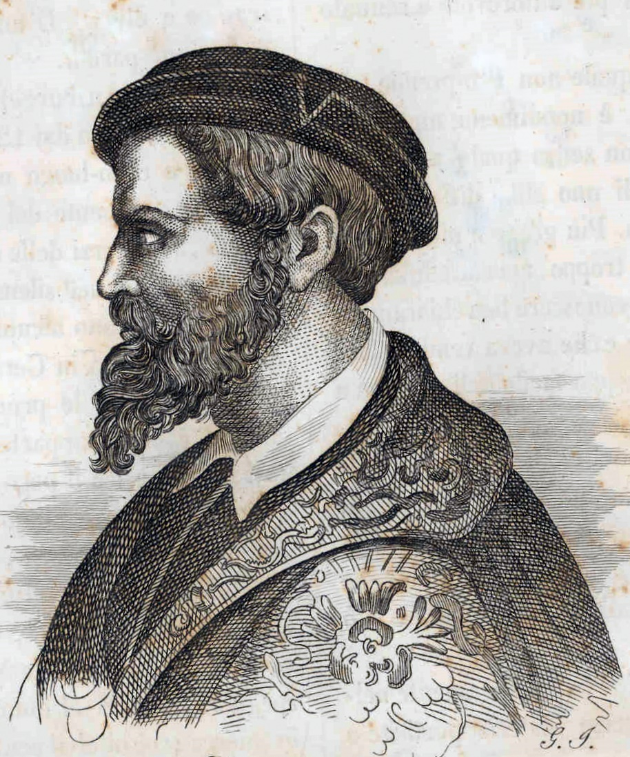 autore sconosciuto, tratta da L'Omnibus Pittoresco luglio 1840, ritratto di Bendetto Varchi, opera il cui autore è morto da più di 70 anni, acquisita da scanner